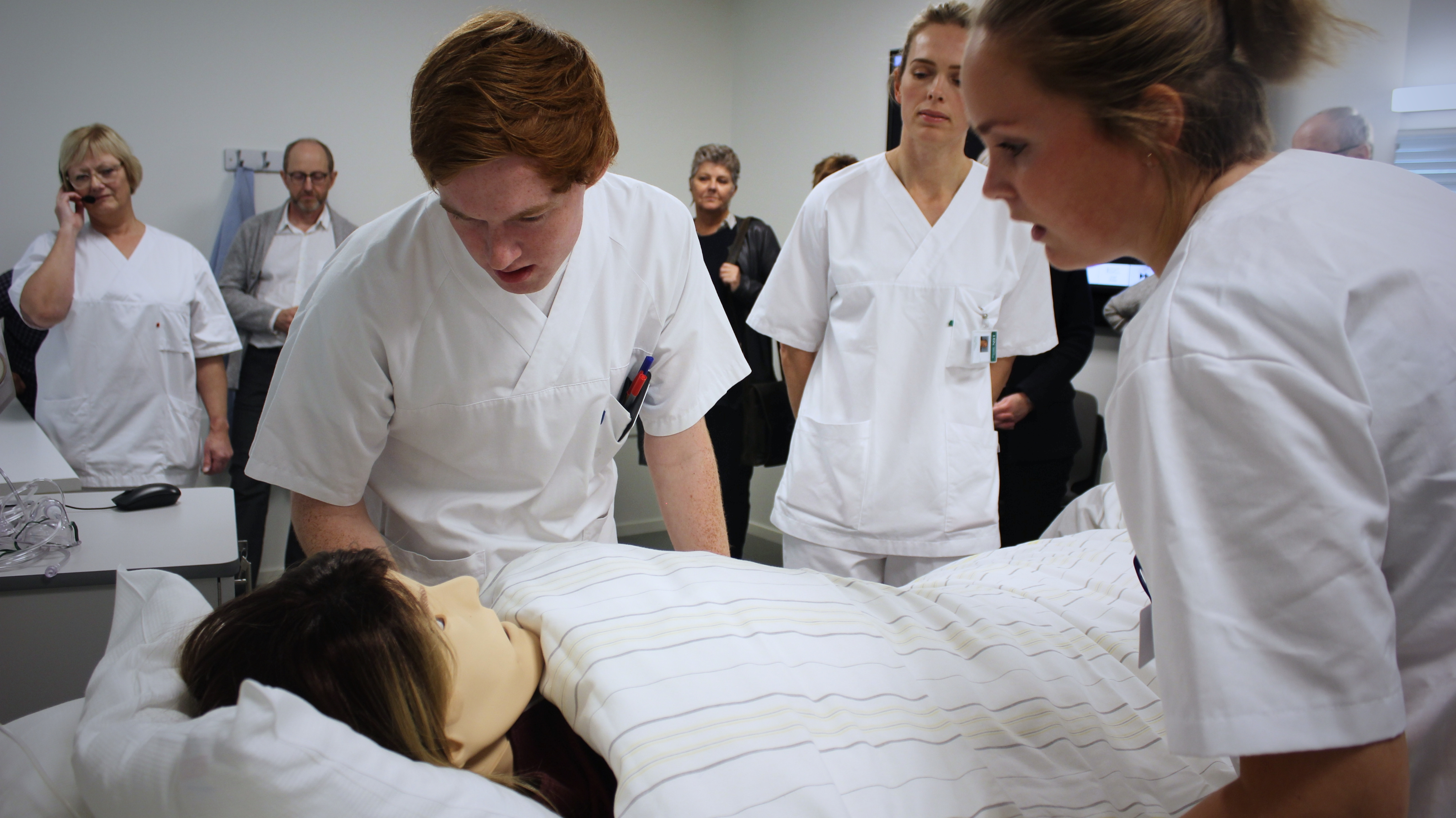 Studentøvelse i simulerings(SIM-)senter ved campus Porsgrunn under offisiell åpning 06.11.17.